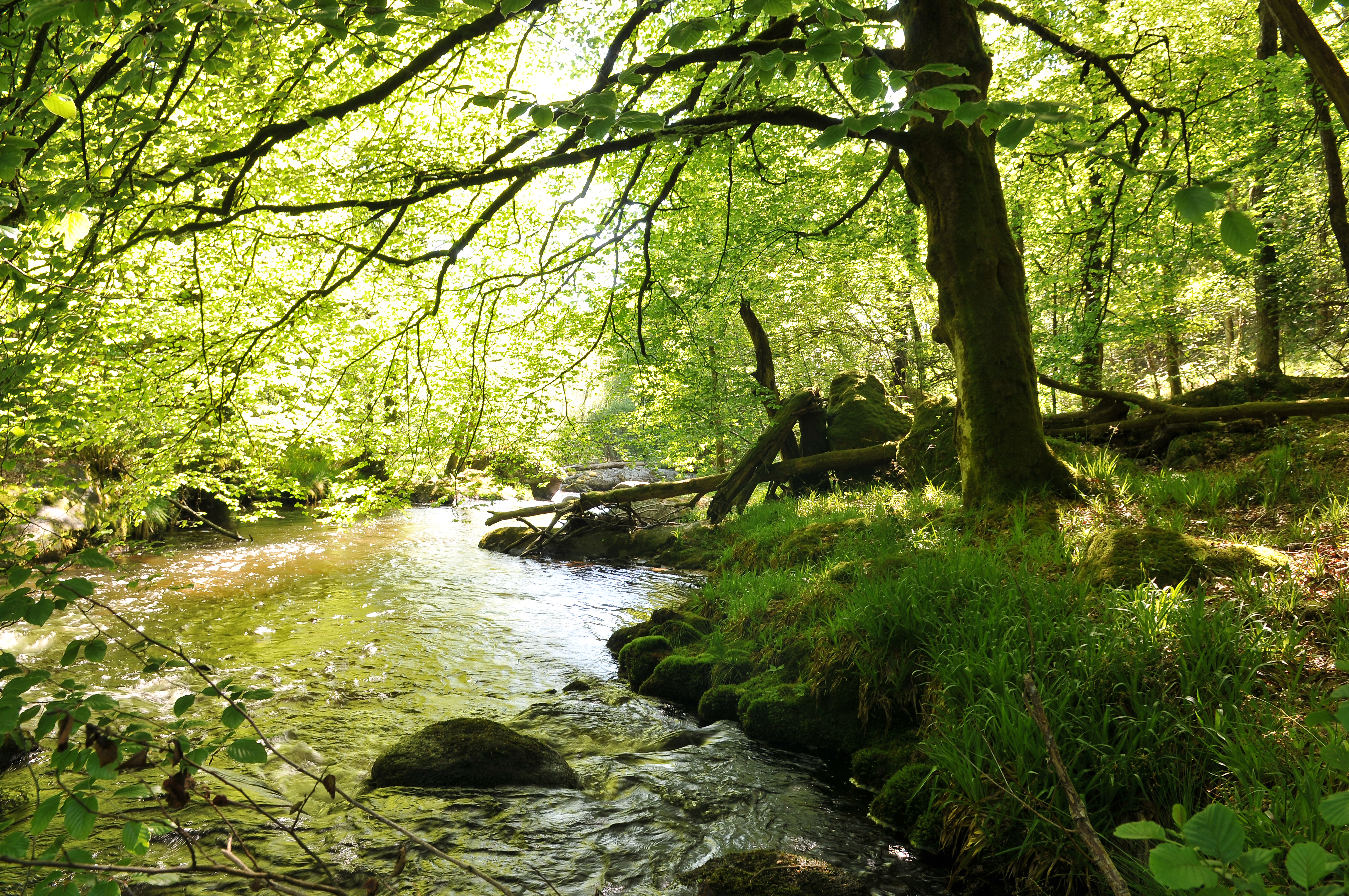 La Vienne entre Tarnac et Rempnat, limite Corrèze/Haute-Vienne